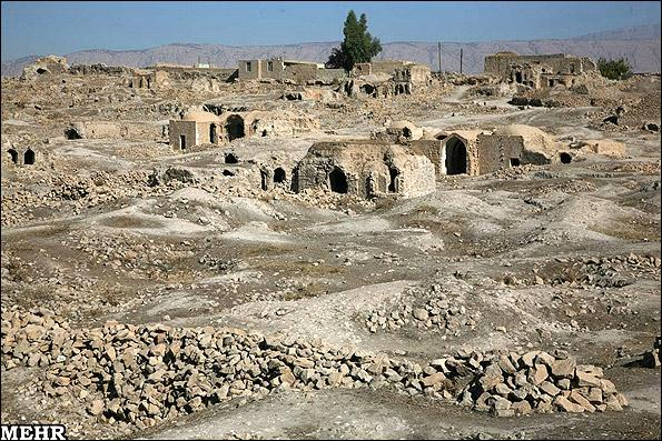 شهرتاریخی بلاد شاپور ( استان گهگلویه و بویراحمد ) شهرستان گهگلویه